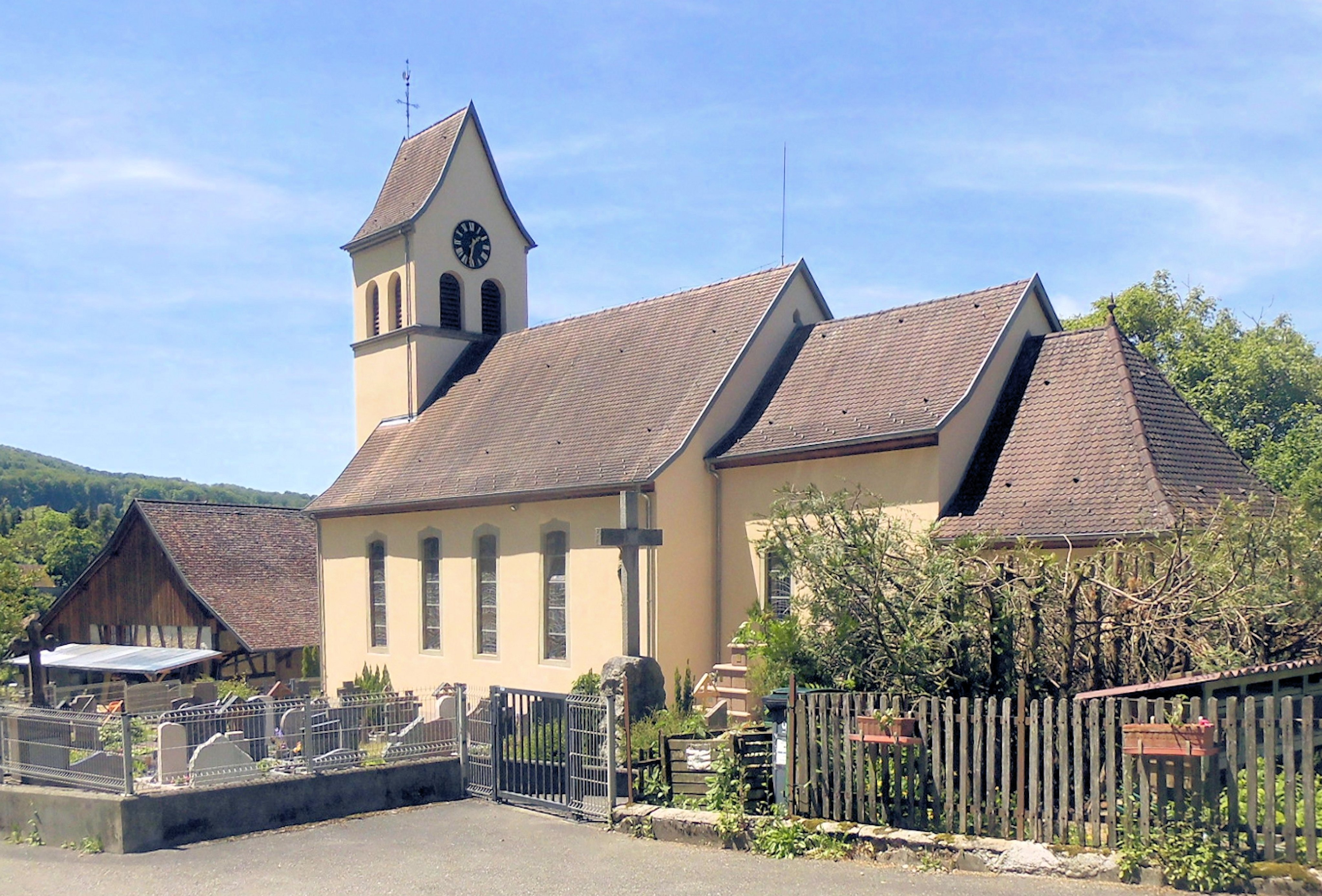 L'eglise Saint-Michel à Biederthal, côté est